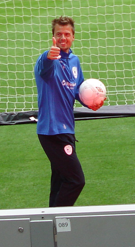 Aleksander Šeliga